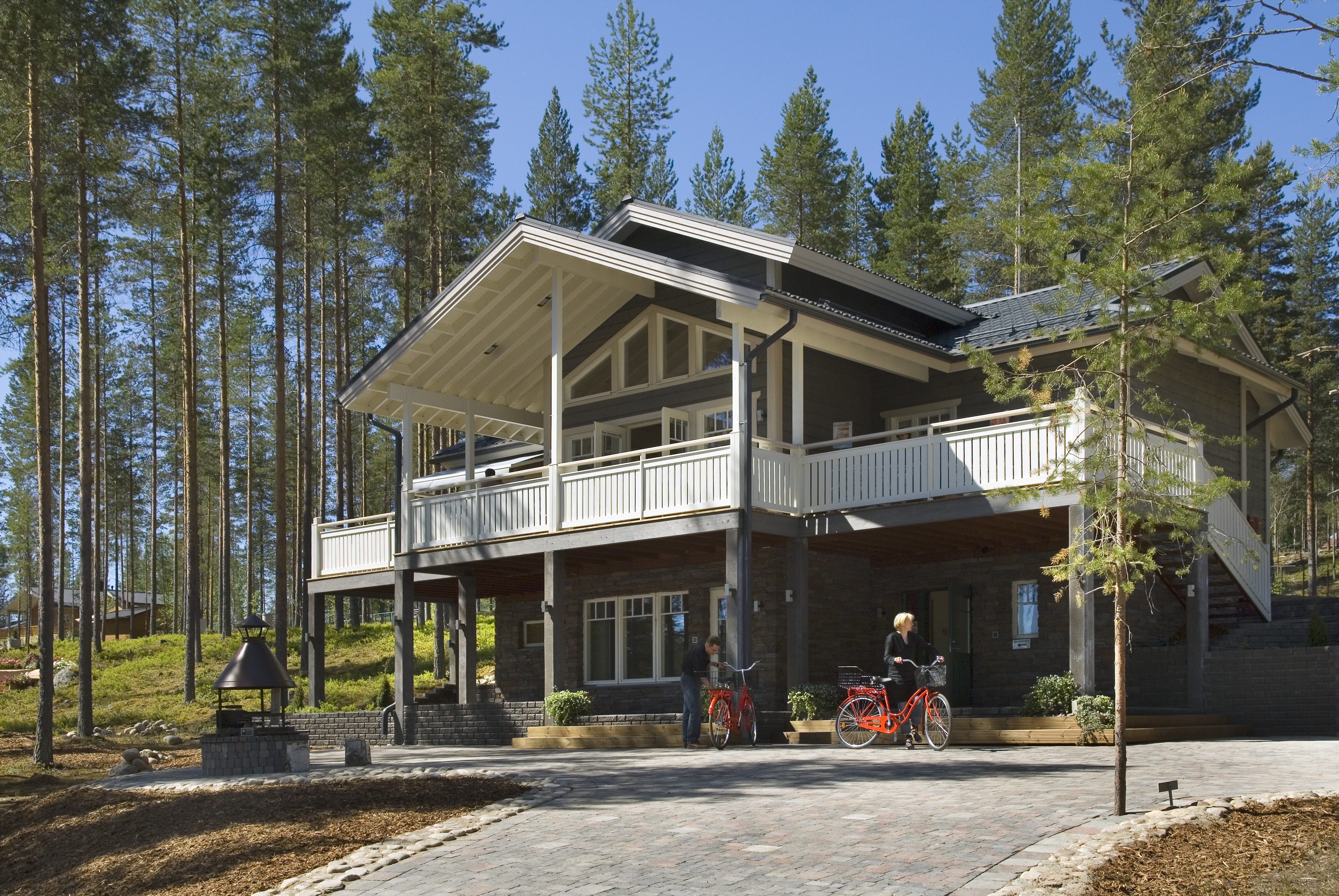 Lapponia House Kaskilinna - Kolin loma-asuntomessujen yleisöäänestyksen voittaja